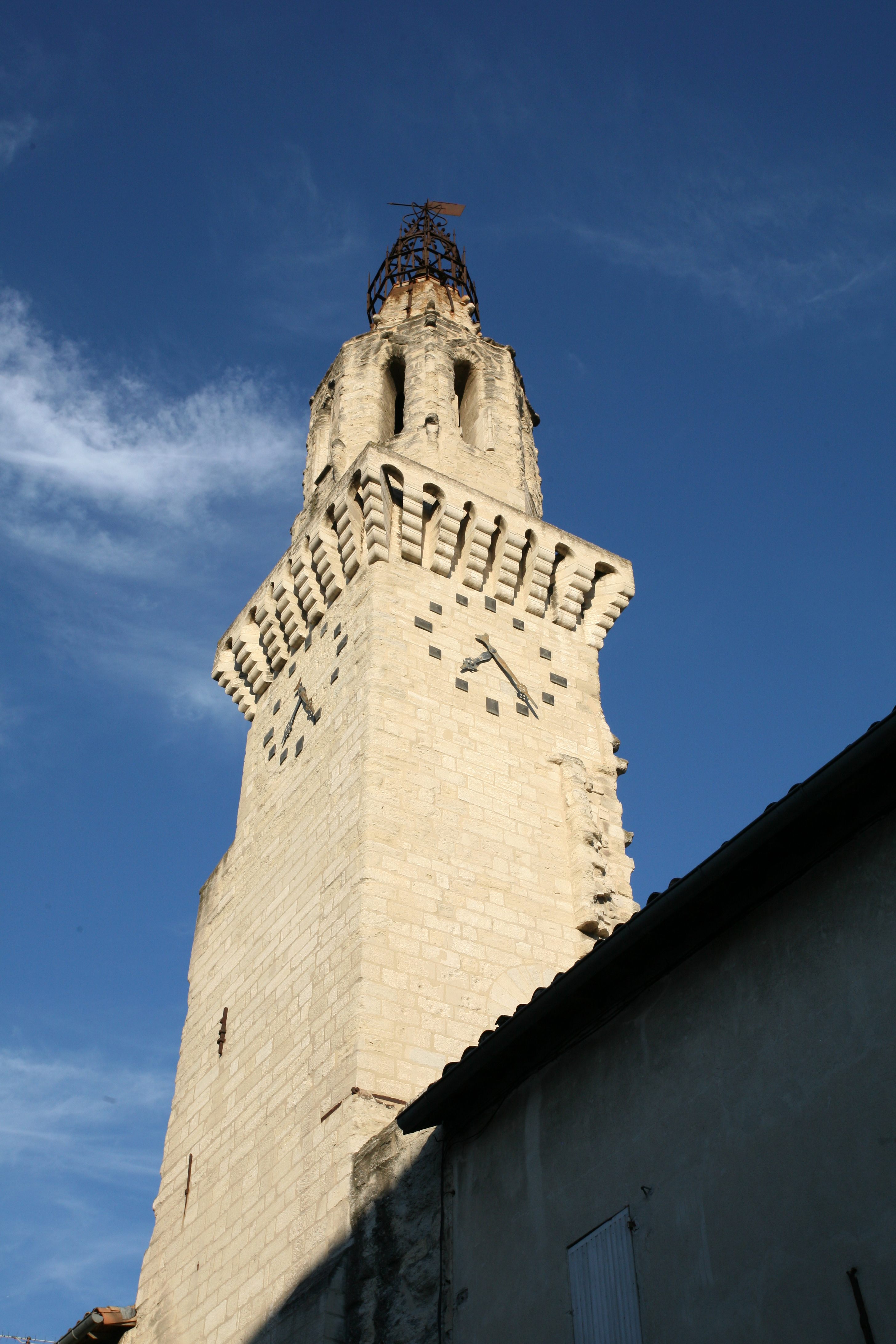 Clocher de l'église des Augustins (Rue de la Carreterie), Avignon, Vaucluse, France